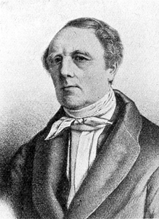 Holger Christian Reedtz født 14. februar 1800 i Odense, død 6. februar 1857), var en dansk diplomat, minister